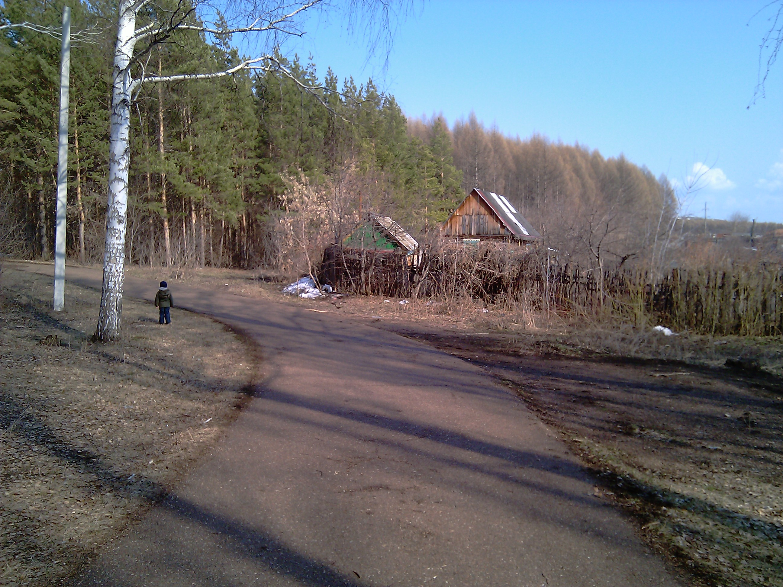 Окраина садовых участков в городе Ишимбае. Освещённая лыжероллерная трасса